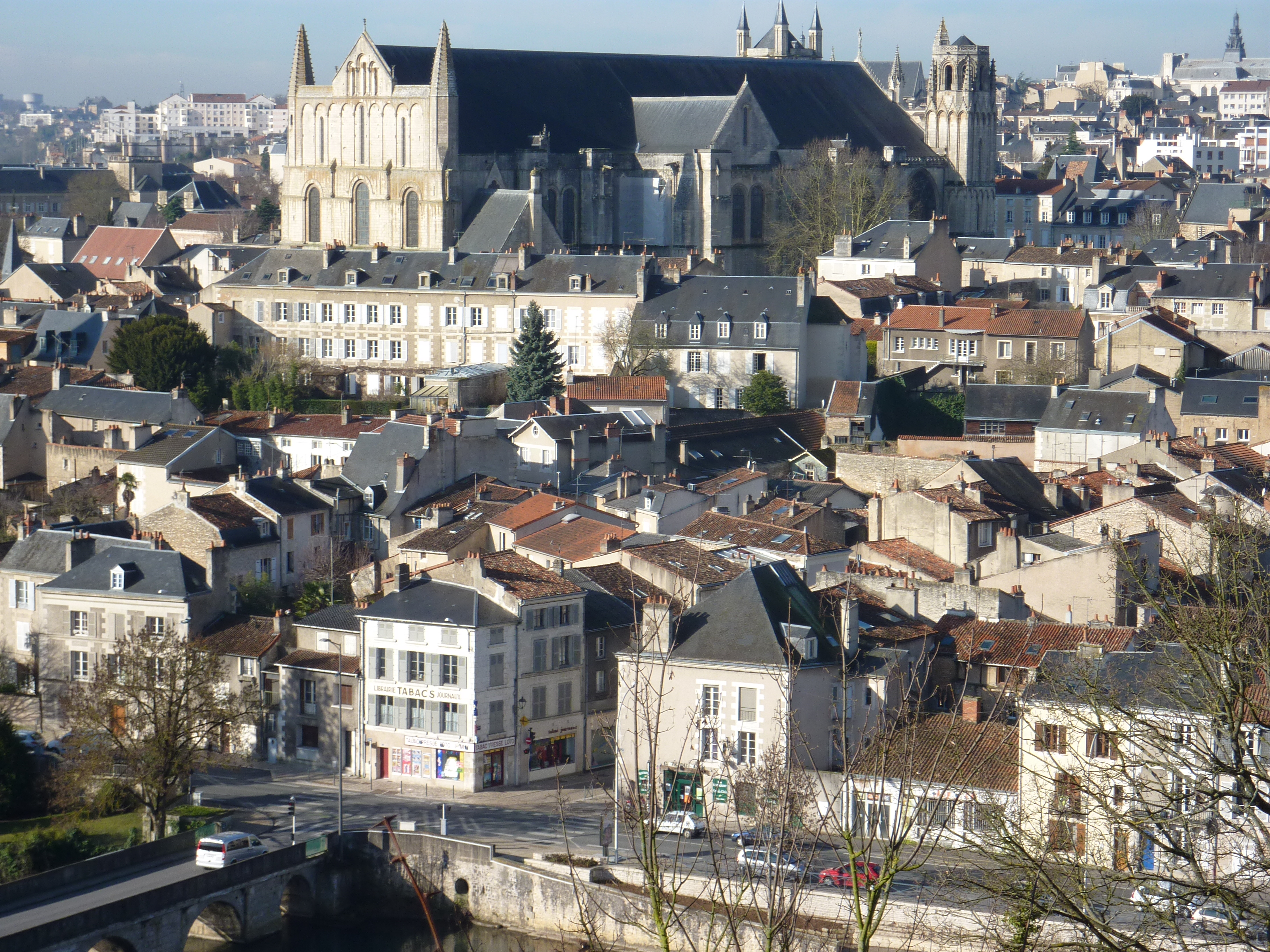 cathédrale Saint Pierre de Poitiers